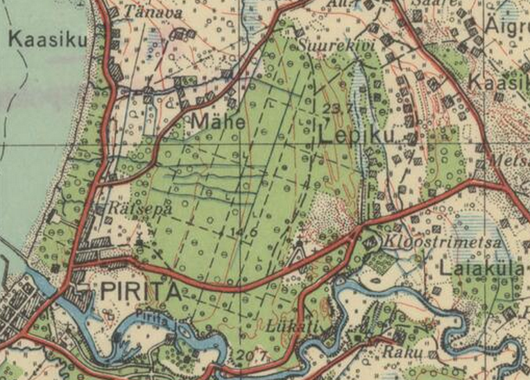 Kloostrimets 1936. aasta Tallinna ümbruse kaardil